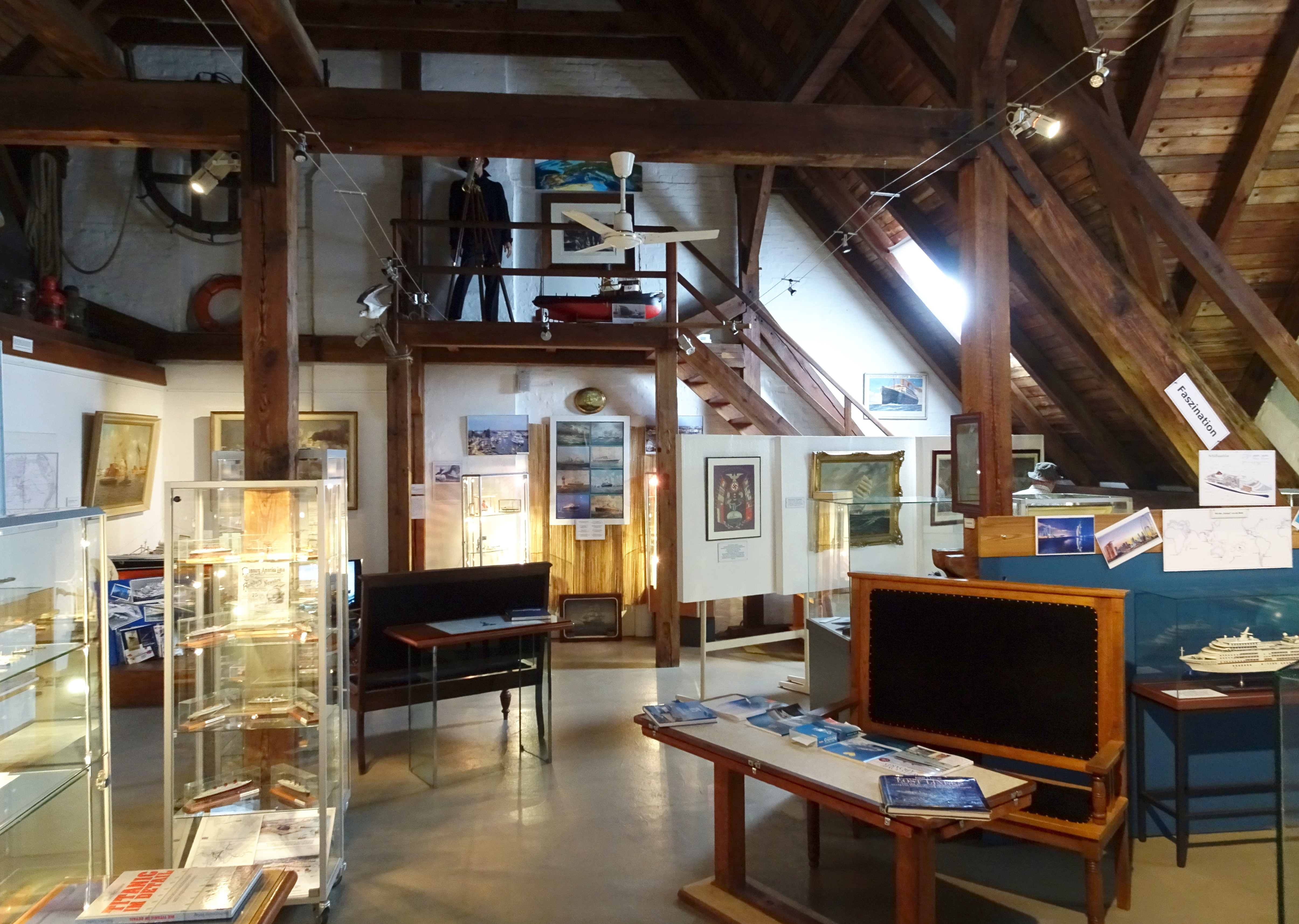 Schiffahrtsmuseum Nordfriesland, Fassade